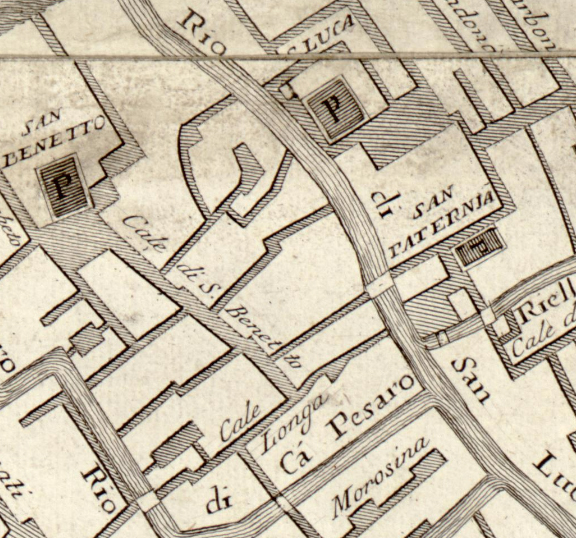 Posizione della chiesa di San Paternian nella mappa di Lodovico Ughi